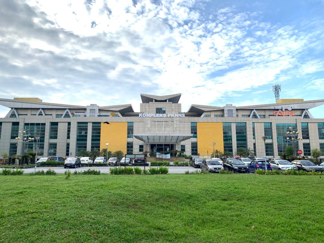 Gambar Bangunan Perbadanan Perpustakaan Awam Negeri Sembilan di Kompleks PKNNS